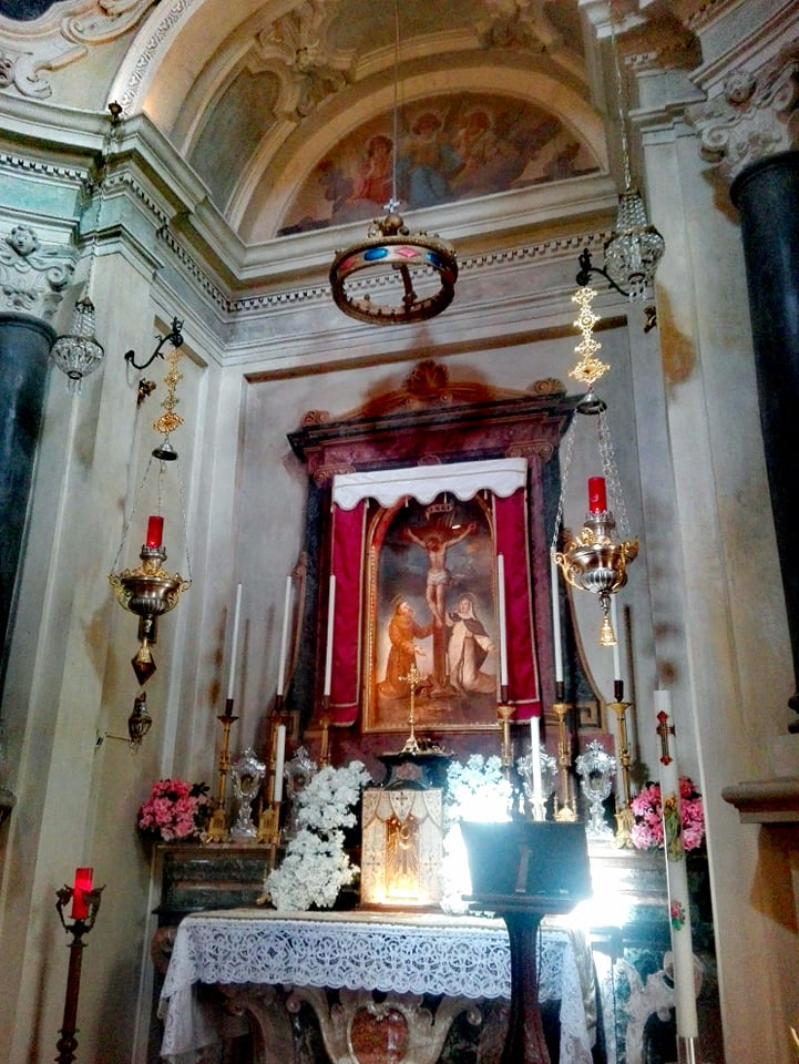 Vigevano, veduta prospettica dell'altare della chiesa del SS. Crocifisso